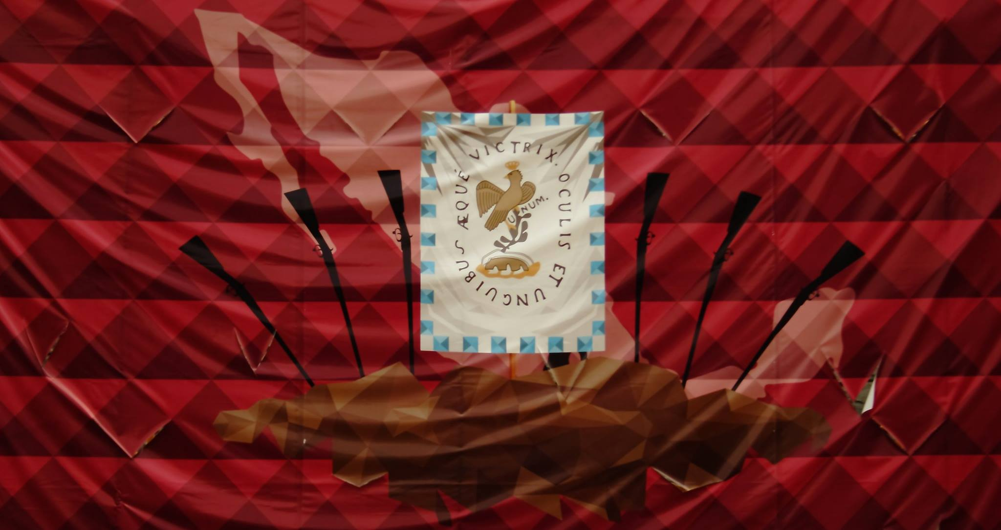 Pancarta con el estandarte:"Victris Oculis et Unguibus Aqué", durante la celebración del día de muertos en Ciudad Universitaria, México